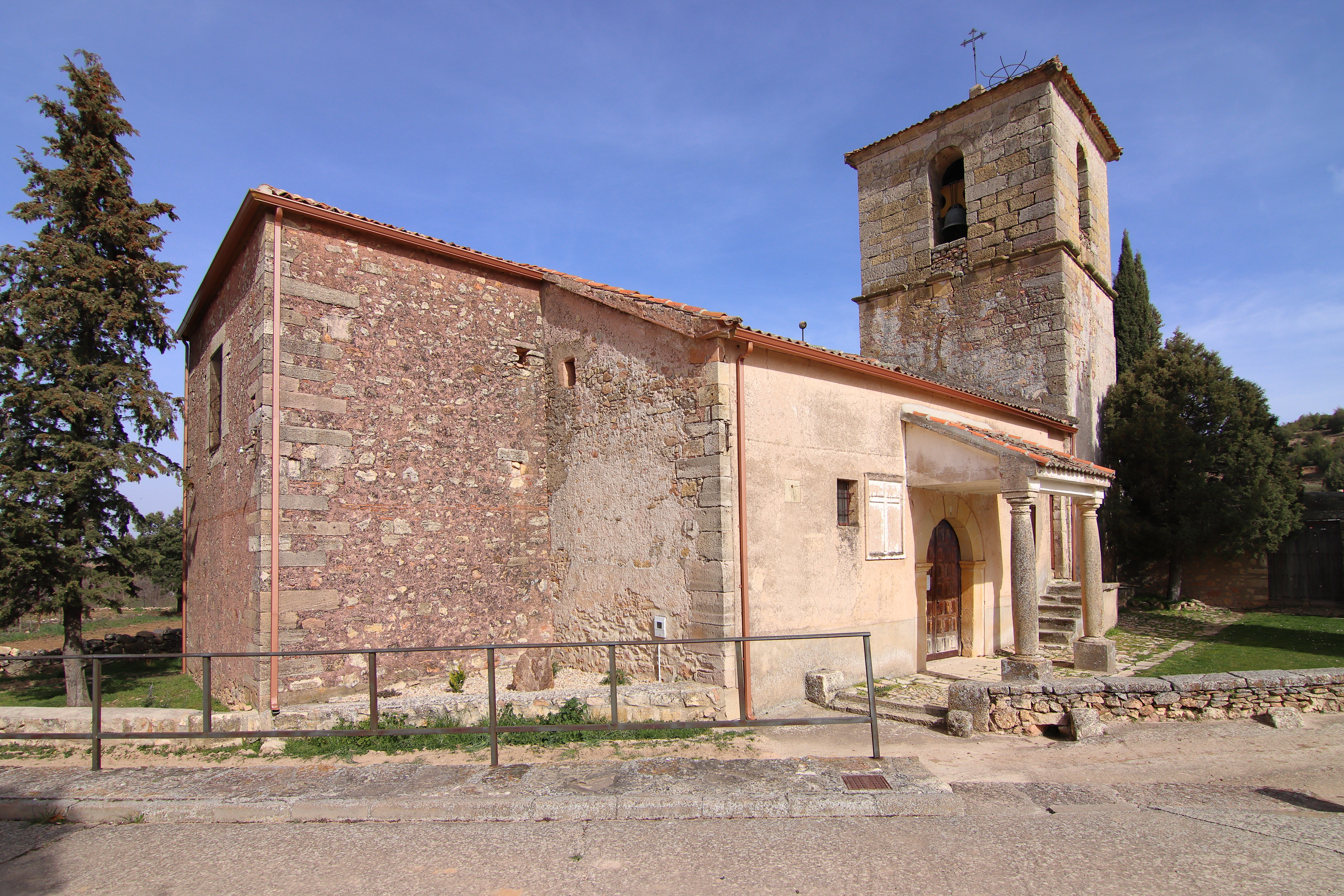 Iglesia de San Mamés, Arevalillo de Cega, suroeste